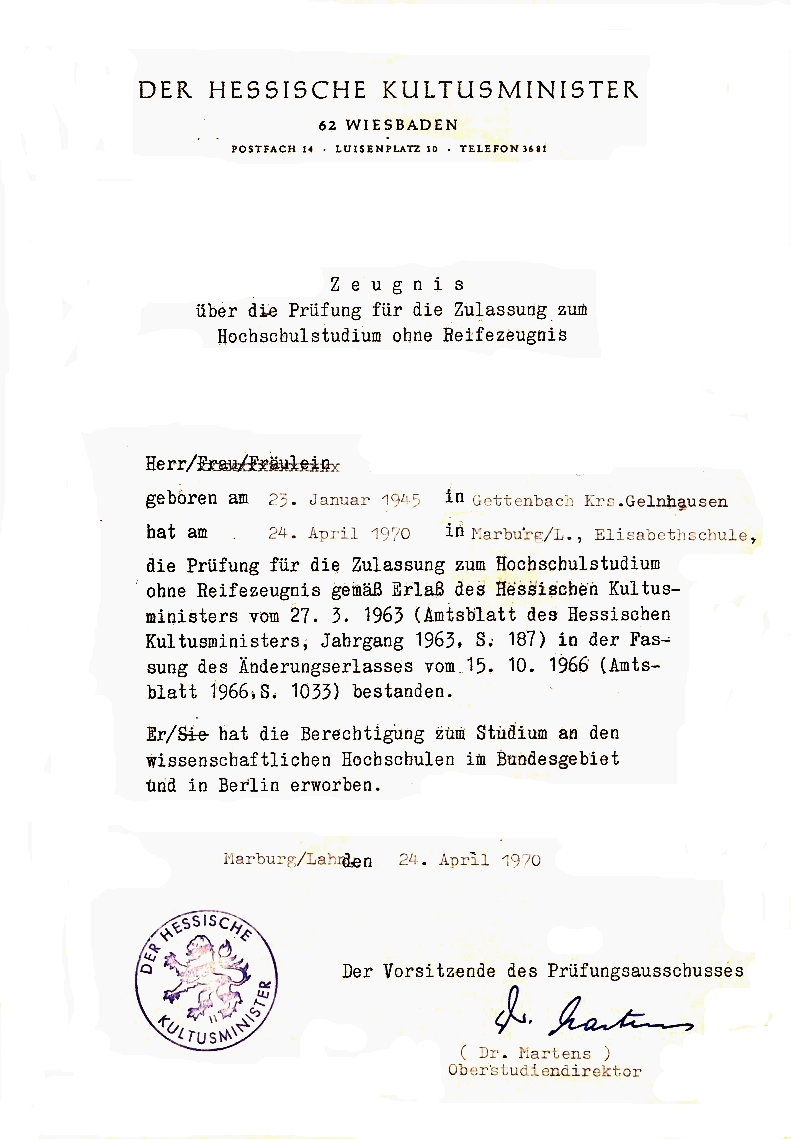 Zeugnis über die Prüfung für die Zulassung zum Hochschulstudium ohne Reifezeugnis (= amtl. Bezeichnung; umgangssprachlich: Begabtenprüfung), erteilt durch den Hessischen Kultusminister 1970